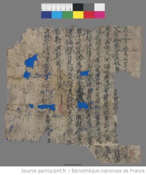 Sujet : nu pu 奴 僕. San nu 三 奴. Sceaux. Manuscrit. Contrat de vente d'esclave, nu pu 奴 僕. Description (Gallica) : Un esclave âgé de 10 ans, surnommé San nu 三 奴 est vendu pour de la soie juan (絹) et une chèvre. Daté du 4e mois intercalaire de la 9e année zhen ming (mai 923). A gauche de la date, une correction à l'encre rouge très pâle de 4 car. : 2e année long de. Il est à noter que l'ère zhen ming ne comporte que 6 années, et l'ère long de 2 années. A la fin du contrat apparaît le titre du vendeur (du tou 都 頭) dont le nom manque…